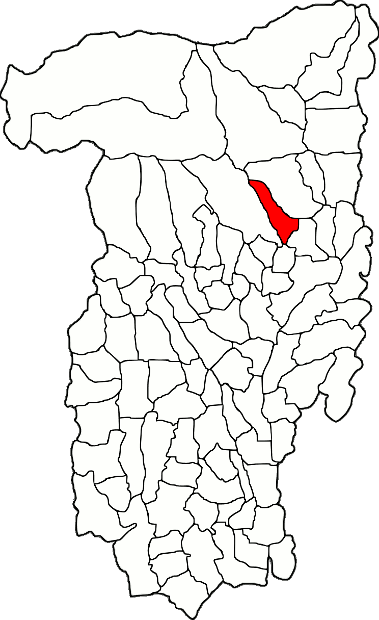 Lage der Gemeinde Muereasca im Kreis Vâlcea (RO).